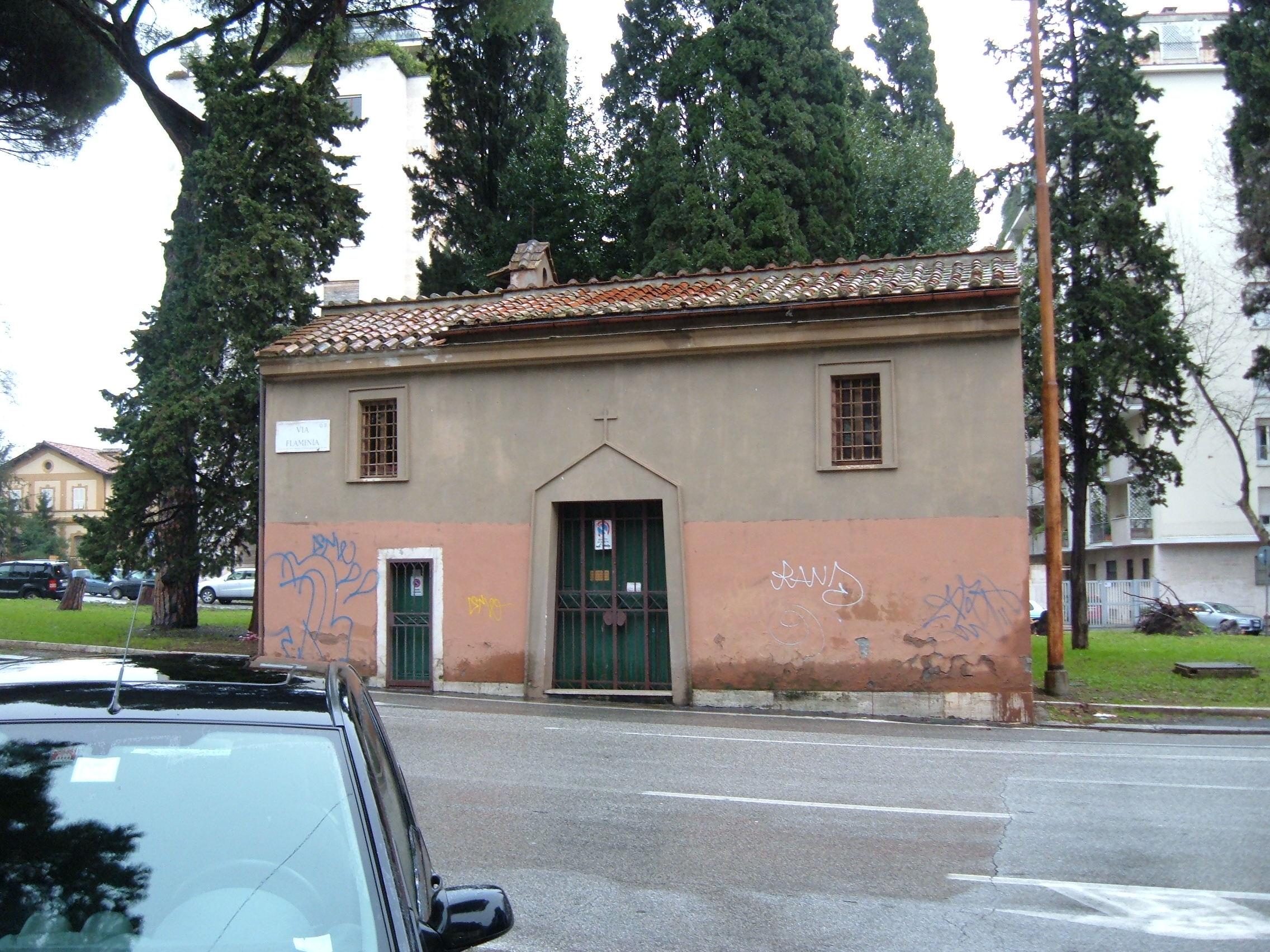 Oratorio di Sant'Andrea a Ponte Milvio, a Roma, nel quartiere Flaminio.